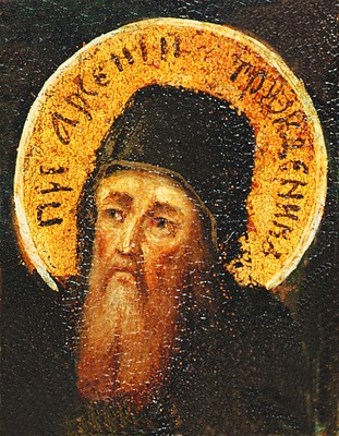 Прп. Арсений Трудолюбивый. Икона “Собор Киево-Печерских святых”. 2-я пол. XIX в. (ЦМиАР). Фрагмент